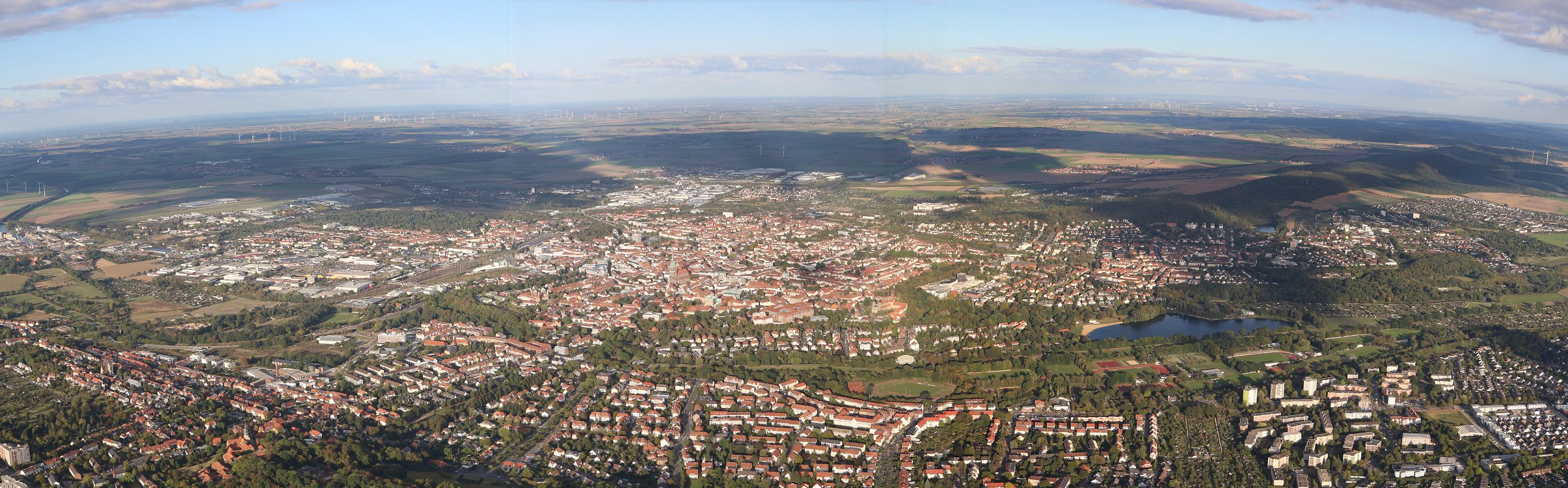 Hildesheim im Oktober 2016